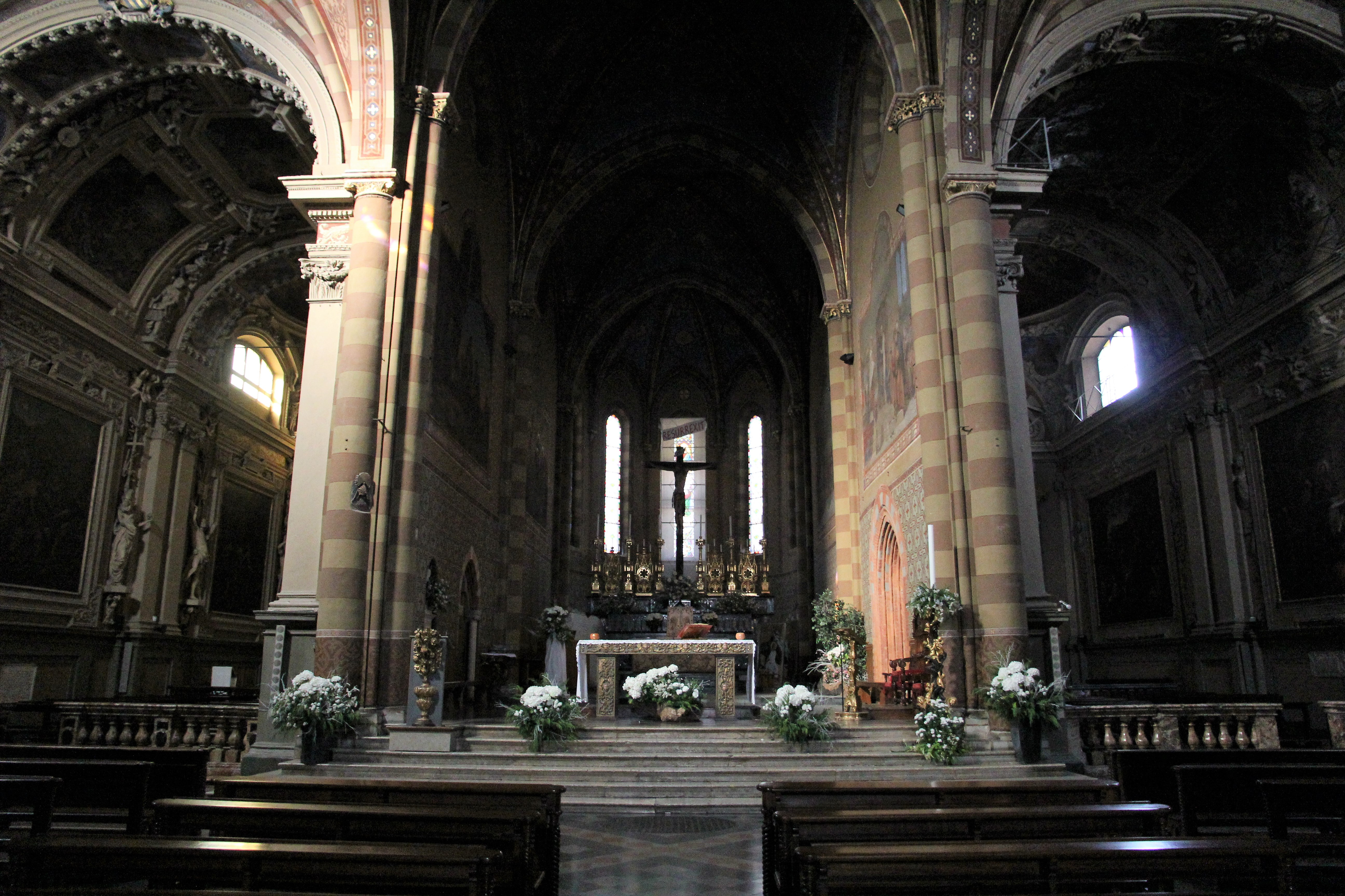 Chieri, chiesa di Santa Maria della Scala